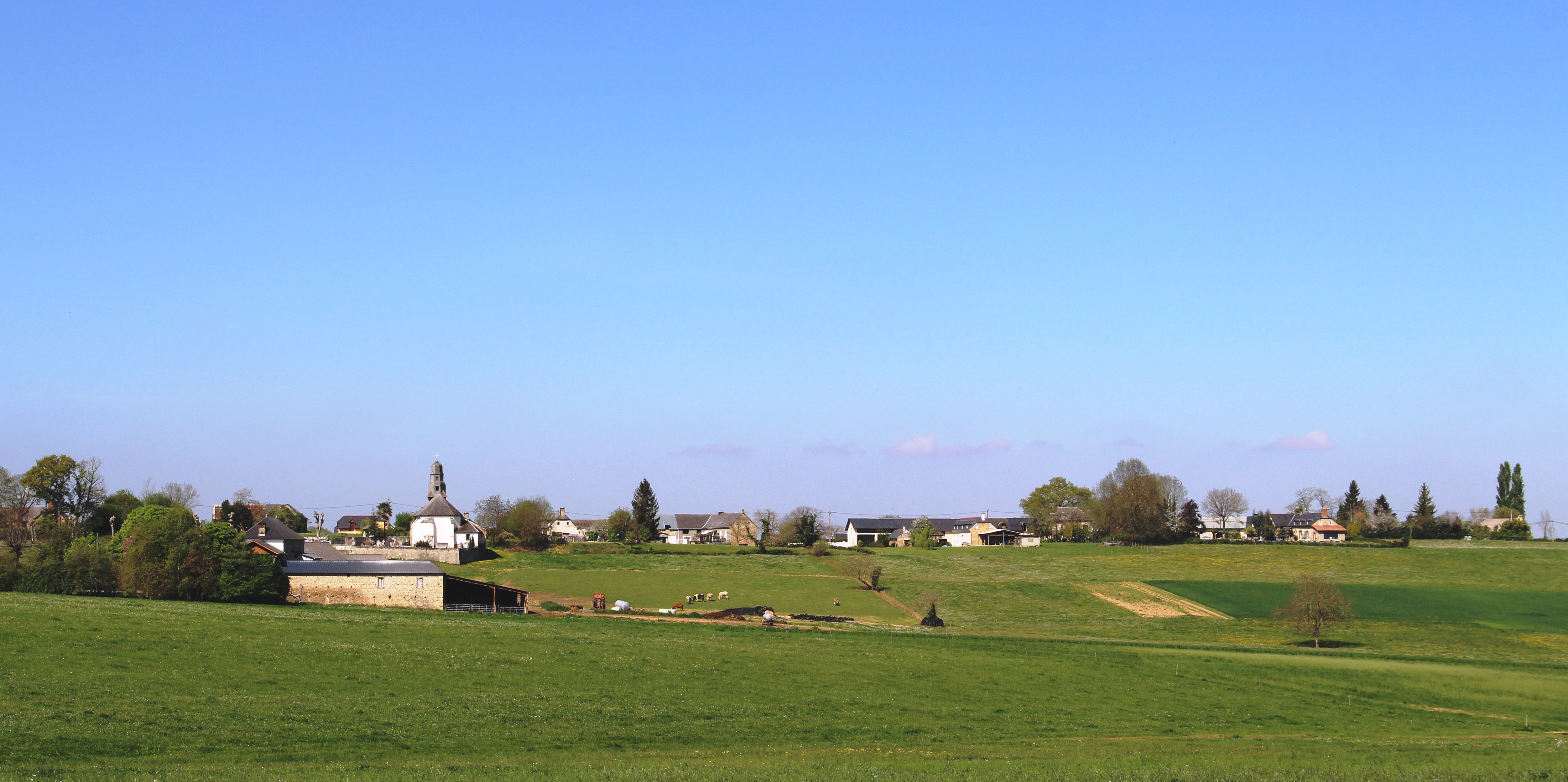 Luc (Hautes-Pyrénées)